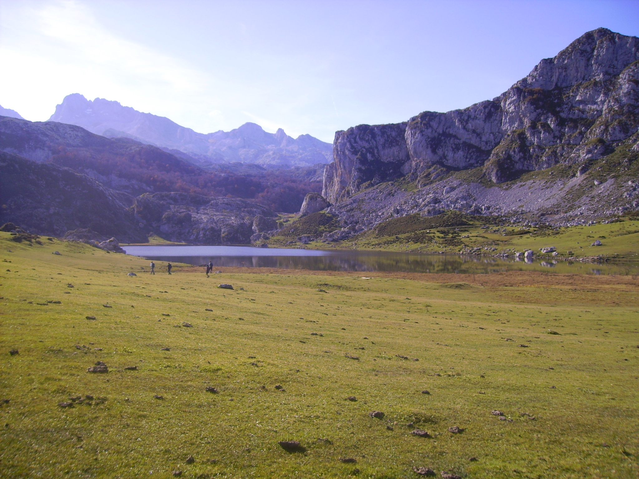 Fotografía del Lago Ercina, tomada desde la Ruta del Enol, en los Picos de Europa, Asturias, España